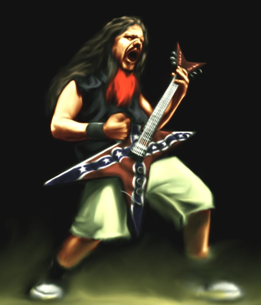 Este es un boceto del gran y famoso guitarrista de PANTERA, asesinado el 8 de diciembre de 2004.